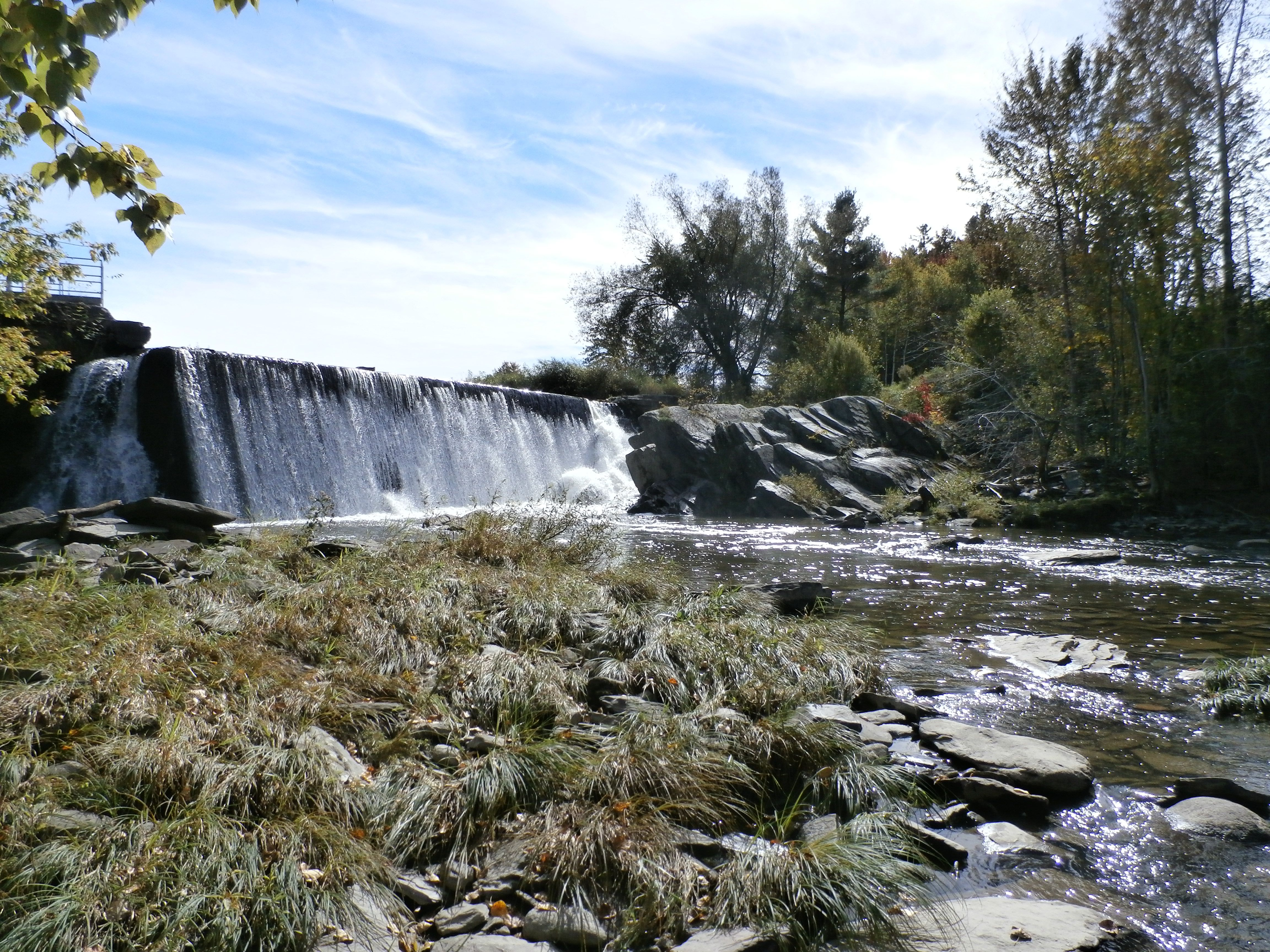 Rivière au Saumon (Massawippi) à Martinville.